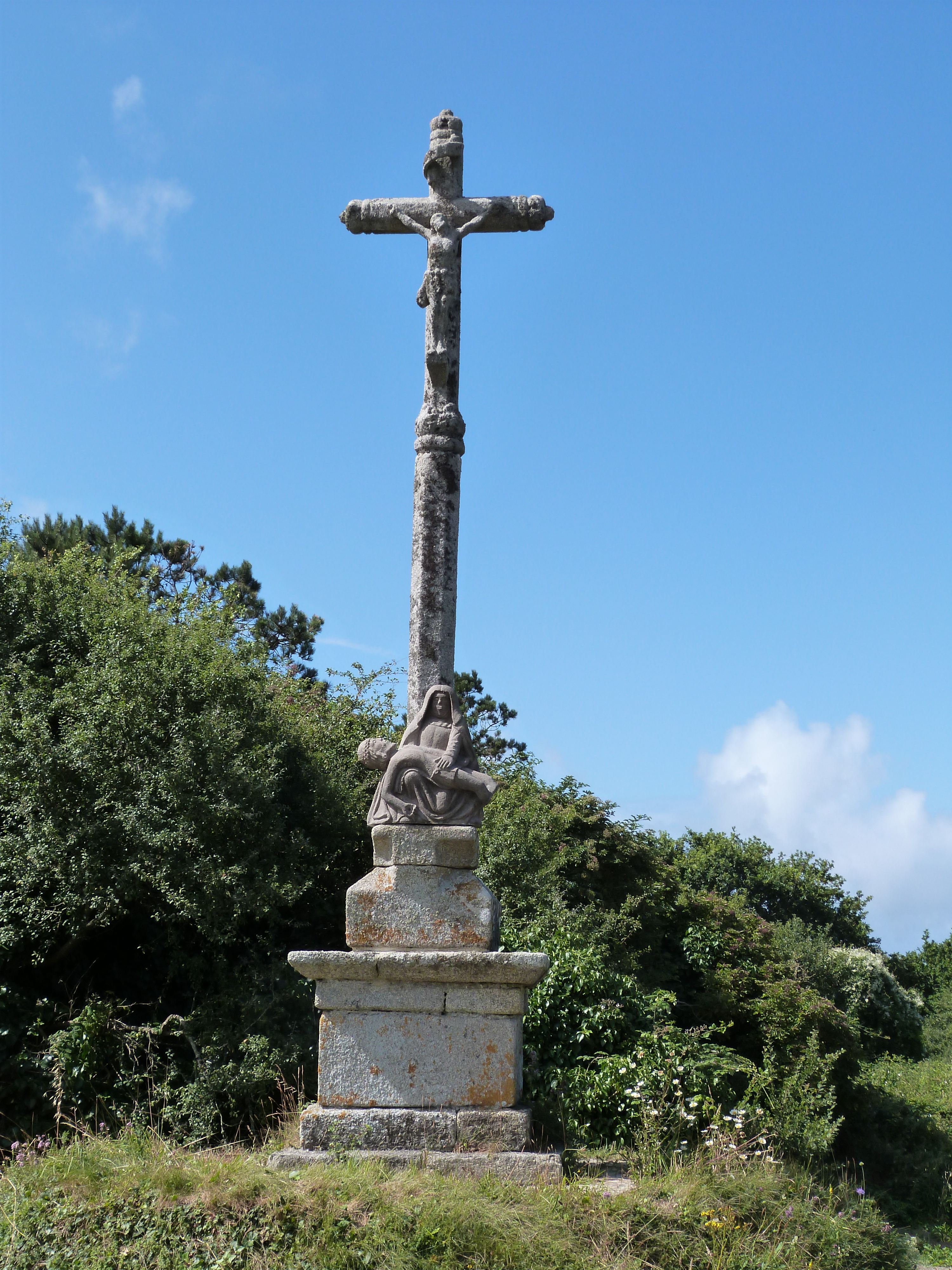 Calvaire de Saint-Evy (XVIème siècle), restauré au XIXème siècle